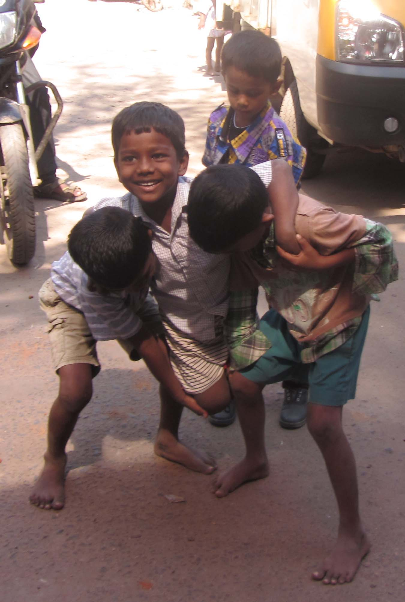 கால் தூக்கிற கணக்கப்பிள்ளை என்னும் தமிழக நாட்டுப்புற விளையாட்டு. own shot.